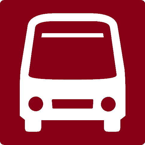 Icono del servicio especial de TransMilenio